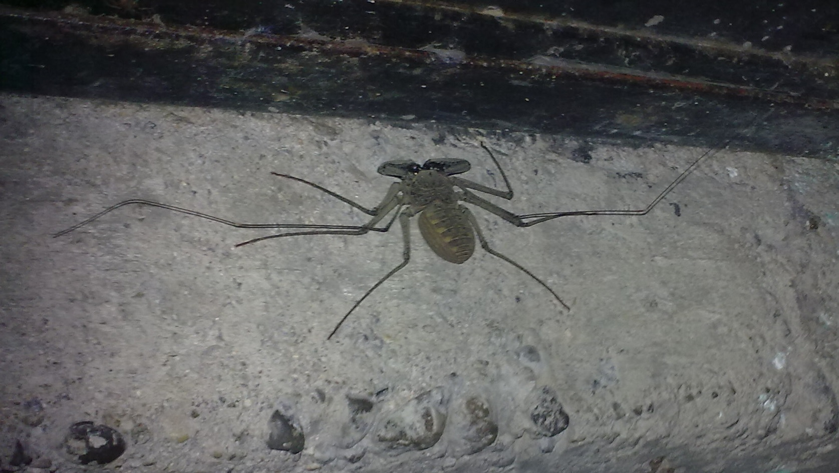 espécimen encontrado en salina cruz Oaxaca 28 diciembre 2012